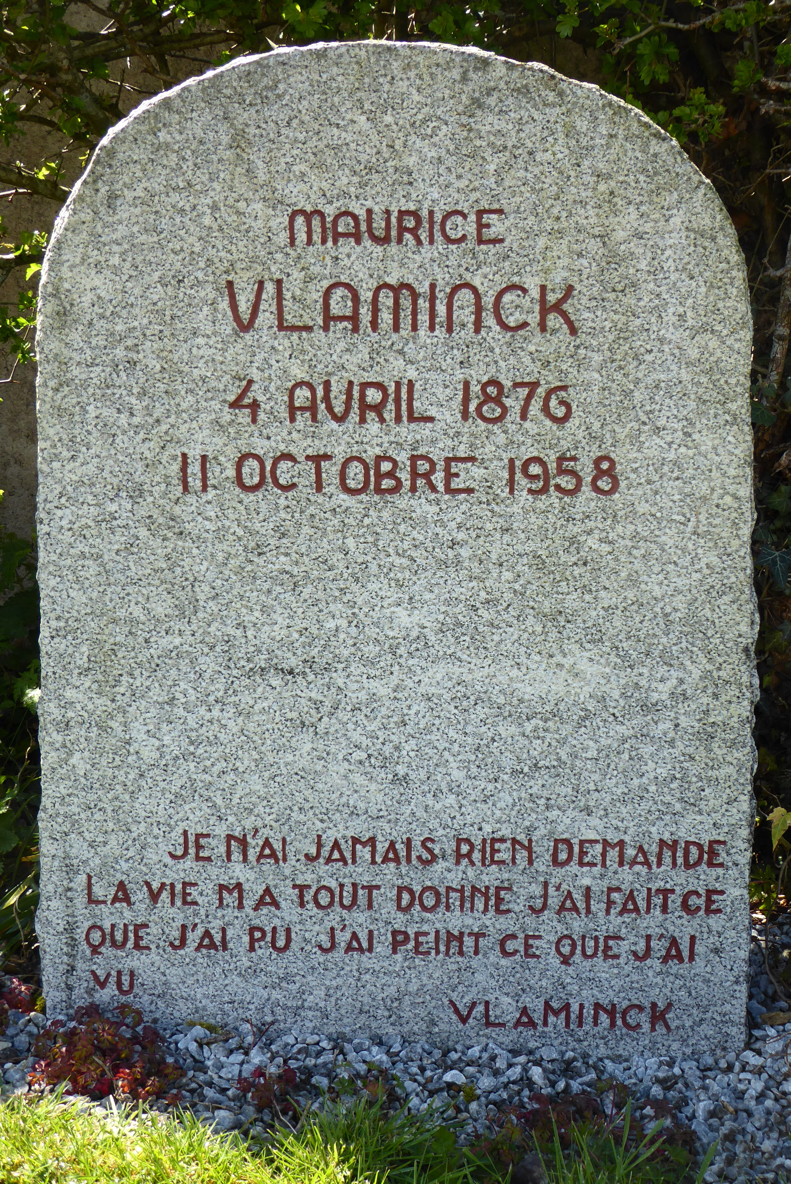 Pierre tombale de Maurice Vlaminck, cimetière de Rueil-la-Gadelière, Eure-et-Loir (France). « Je n'ai jamais rien demandé La vie m'a tout donné J'ai fait ce que j'ai pu J'ai peint ce que j'ai vu Vlaminck ».